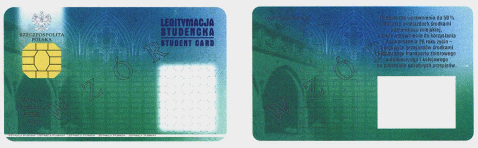 Wzór elektronicznej legitymacji studenckiej nr 17 TP-PR